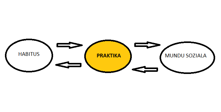 Bourdieuren Habitus eta Mundu sozialaren arteko harremana